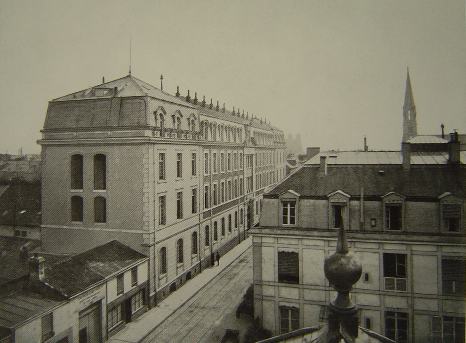 Bâtiment du Collège Saint-Joseph situé Faubourg Cérès à Reims